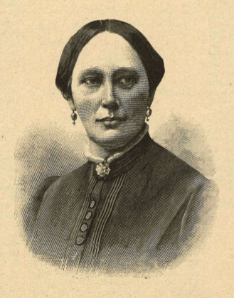 Amanda Kerfstedt i tidskriften Idun 1891.